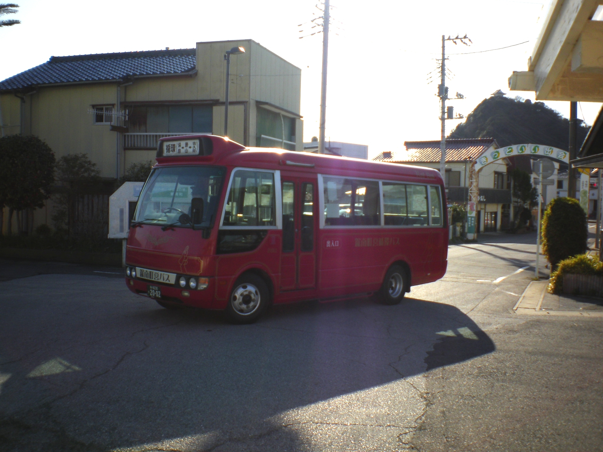 三菱ふそう・ローザ 袖ヶ浦230う2002 千葉県安房郡鋸南町・JR安房勝山駅にて投稿者本人が撮影。